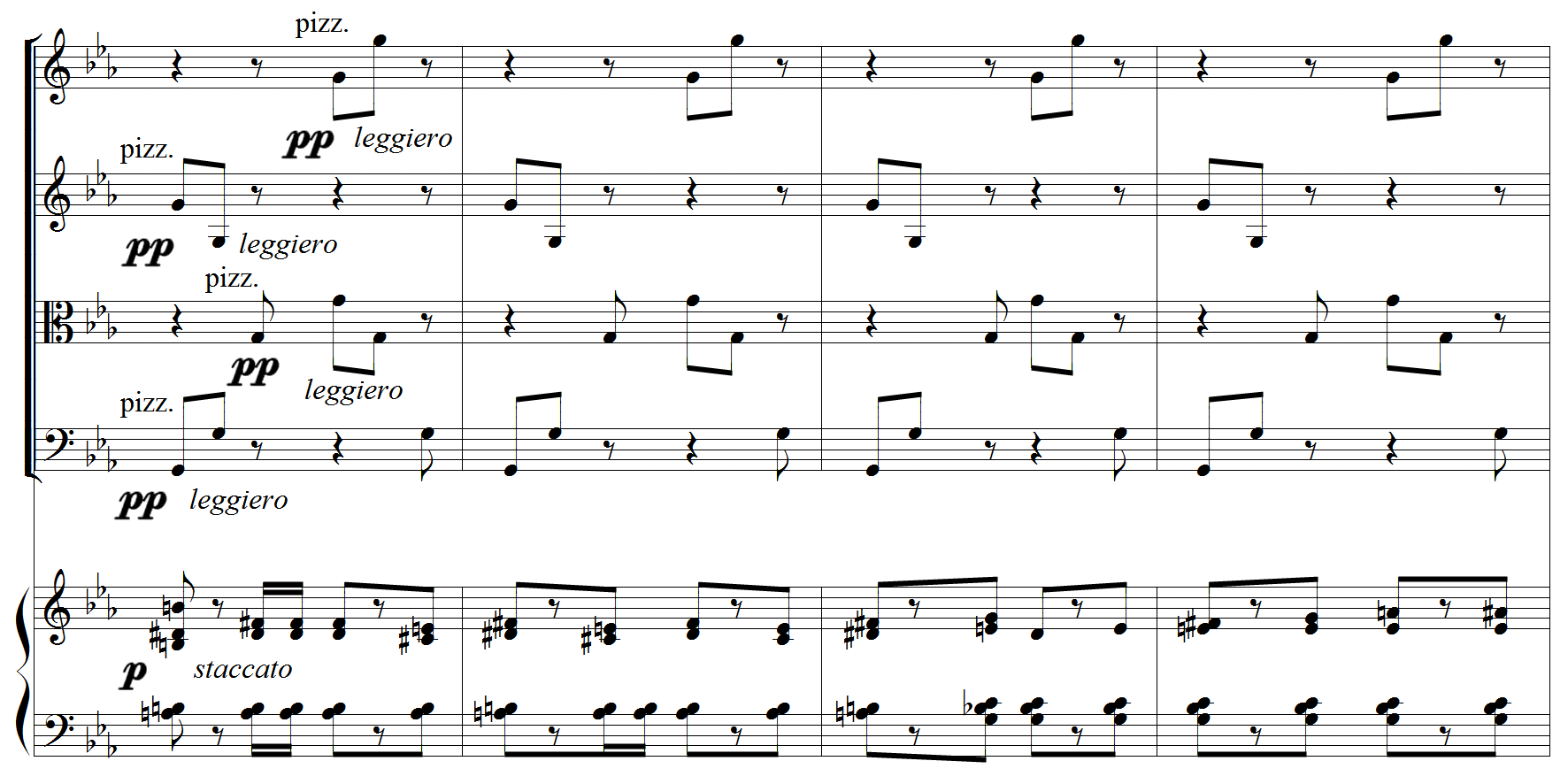 Louis Vierne, Quintette pour piano et cordes, op.42, 3e mouvement, mes. 134-137